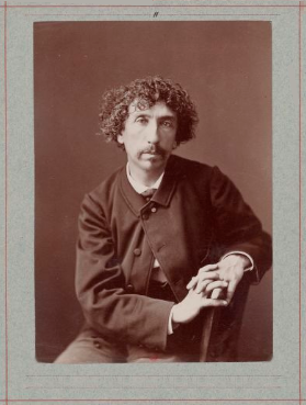 Charles Garnier photographié par Nadar en 1870